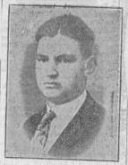 Димитър Паликрушев.